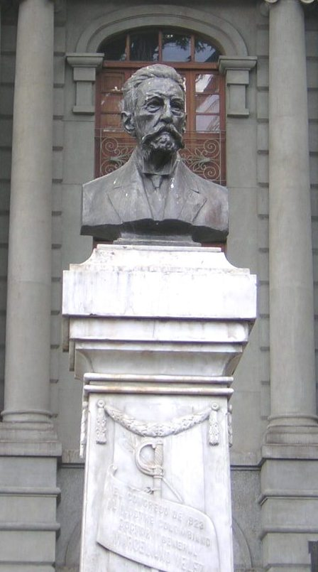 Busto de Marceliano_Vélez_Barreneche, ubicado en La Plazuela San Ignacio, Medellín, Colombia